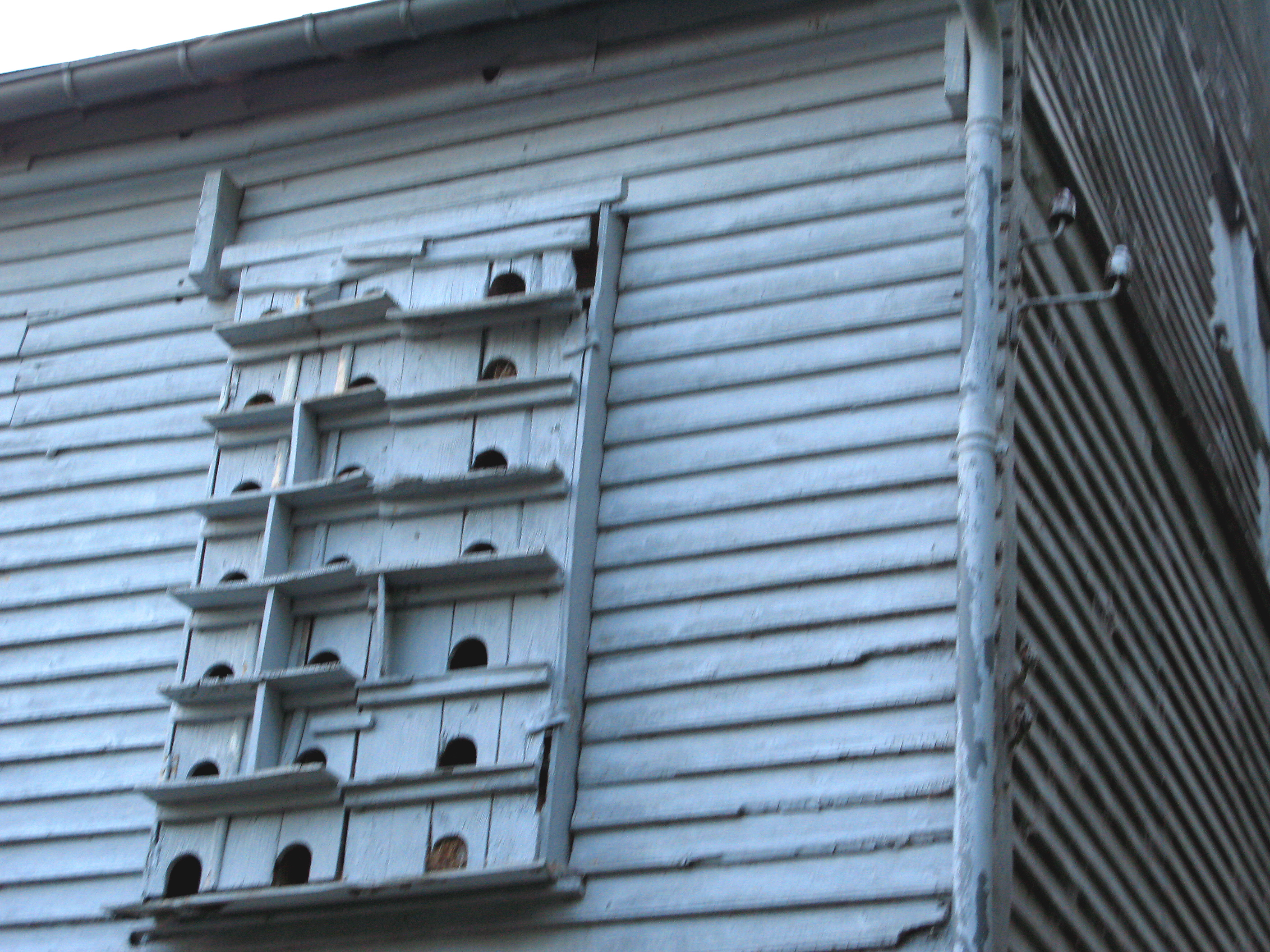 Visse, hameau de la commune de Maisnières (Somme, France) - Colombier du moulin. Cette vue est légèrement floue ...